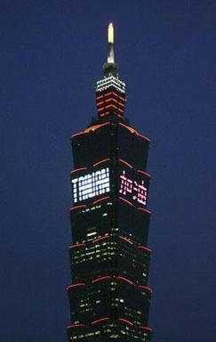 2009年8月